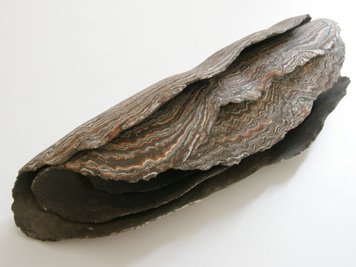 Lidia Boševski: "Bark", 2006. godine, mixsed clay, 60x80x16 cm